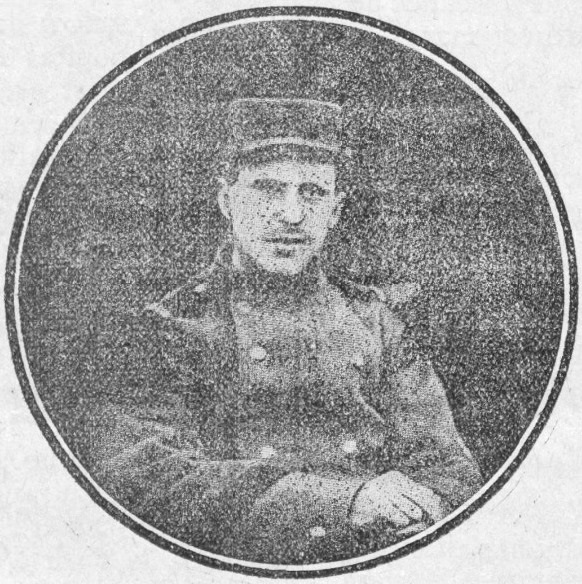 "Jules-André Peugeot, assassiné en France le 2 août 1914 par un officier allemand."